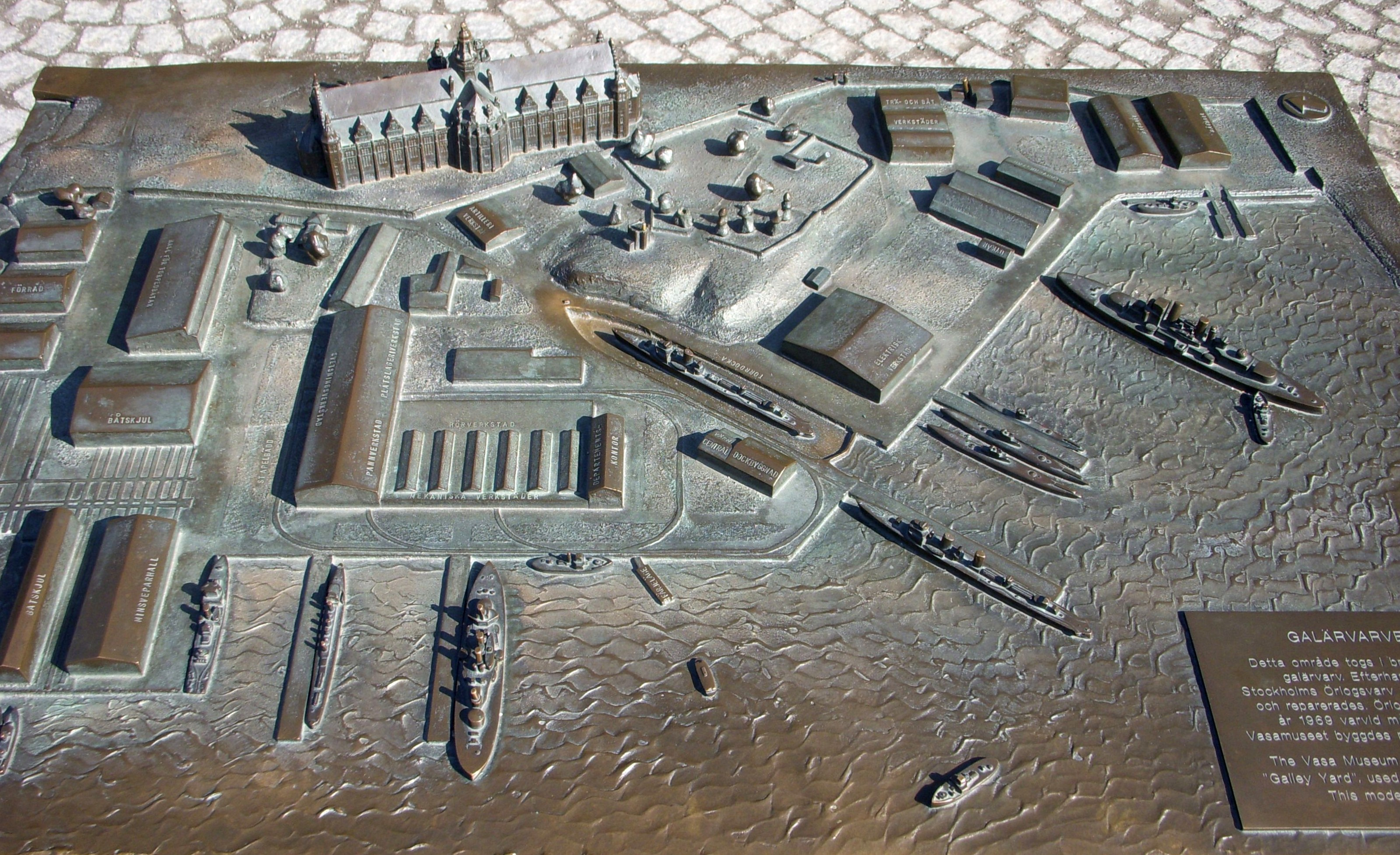 Modell av Galärvarvet från 1942 i Galärparken i Stockholm, efter en idé av arkitekt Erik Ahnborg